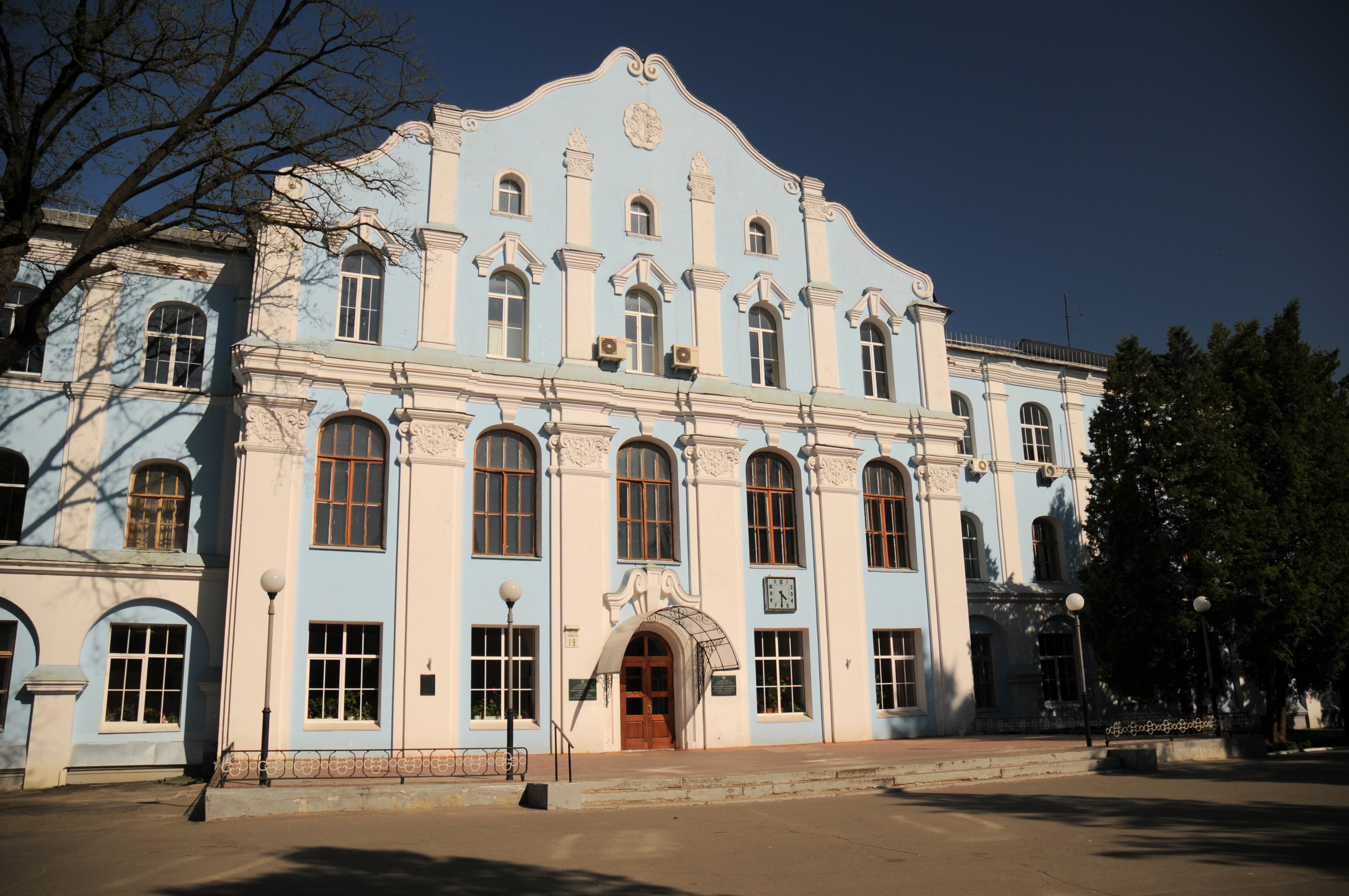 Інститут лісоінженерний (уч. корп. № 1), Київ, Родимцева Генерала вул., 19